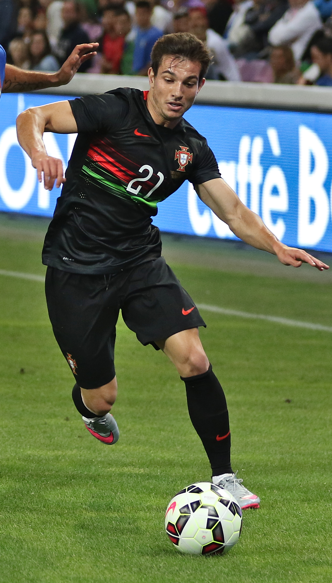 20150616 - Portugal - Italie - Genève - Antonio Candreva et Cédric Soares